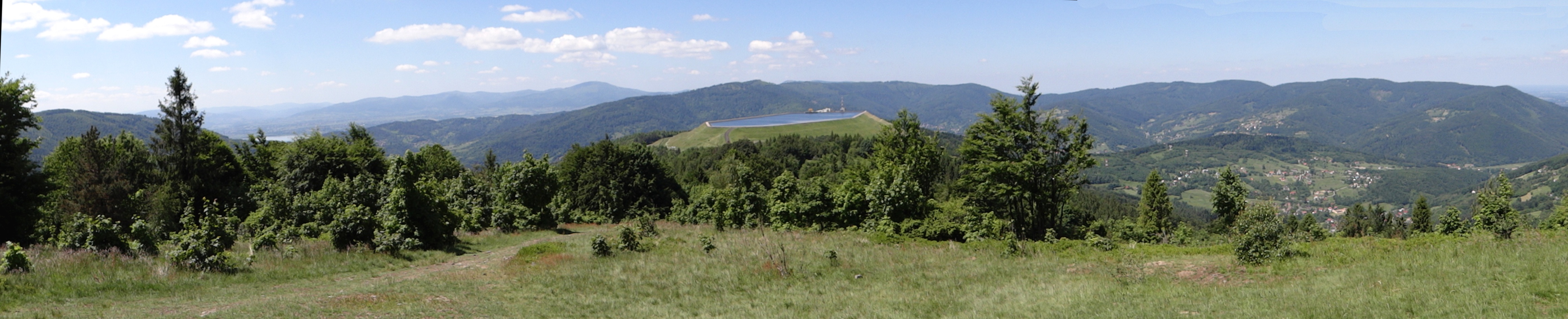 Widok spod szczytu Kiczery